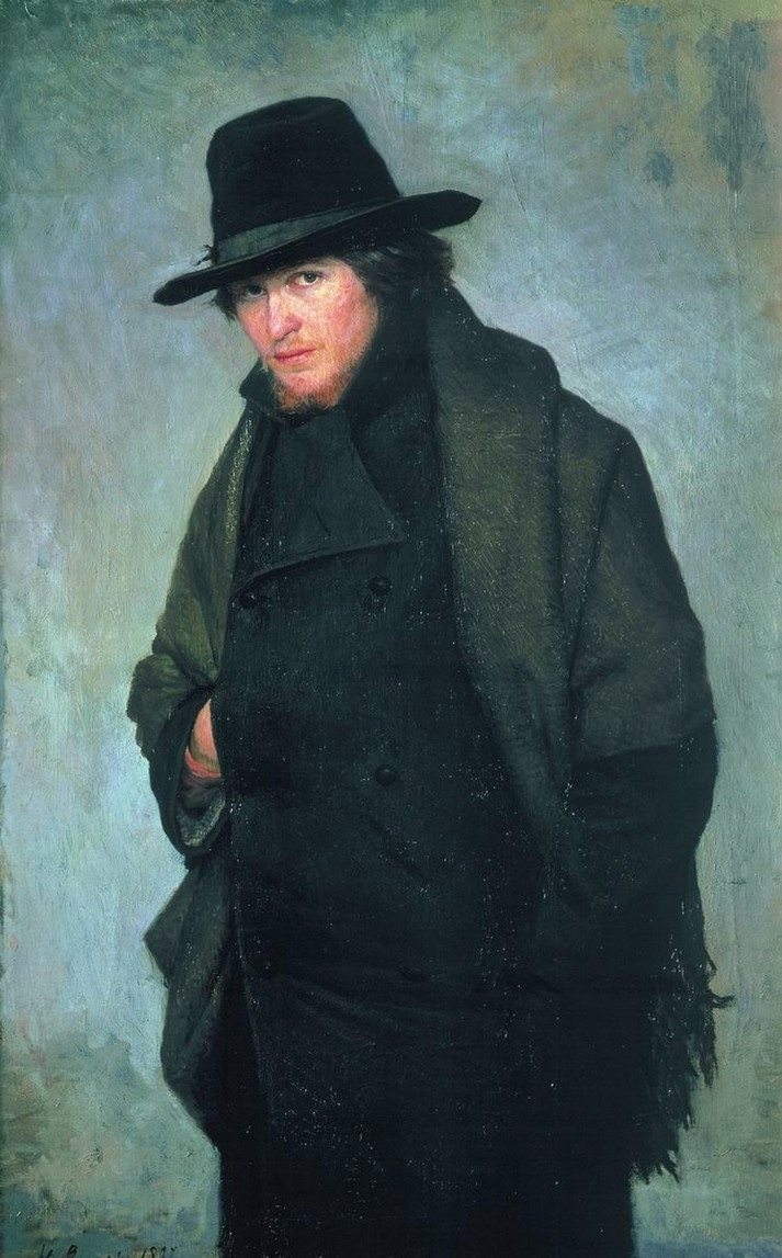 Lo Studente